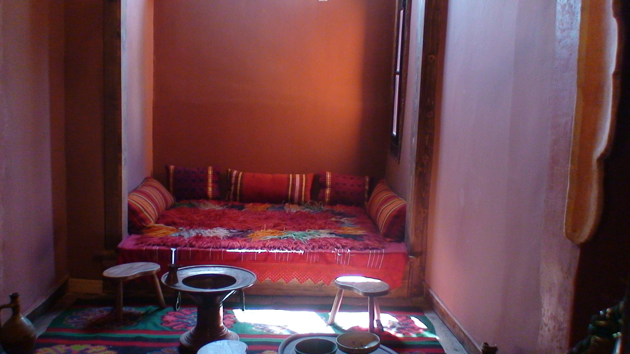 Casa Hindliyan - 22